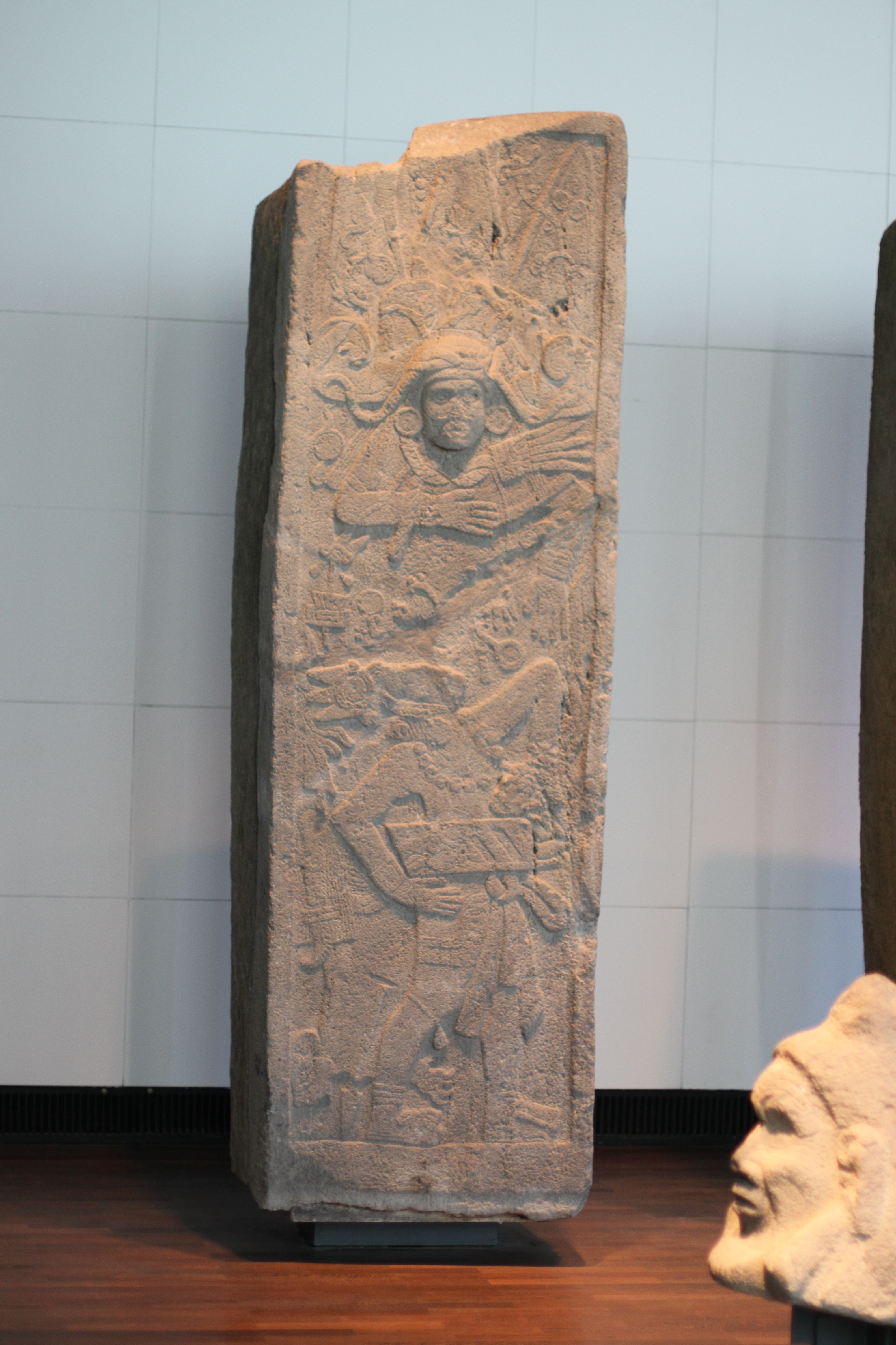 Mesoamerikaabteilung im Ethnologischen Museum, Berlin-Dahlem